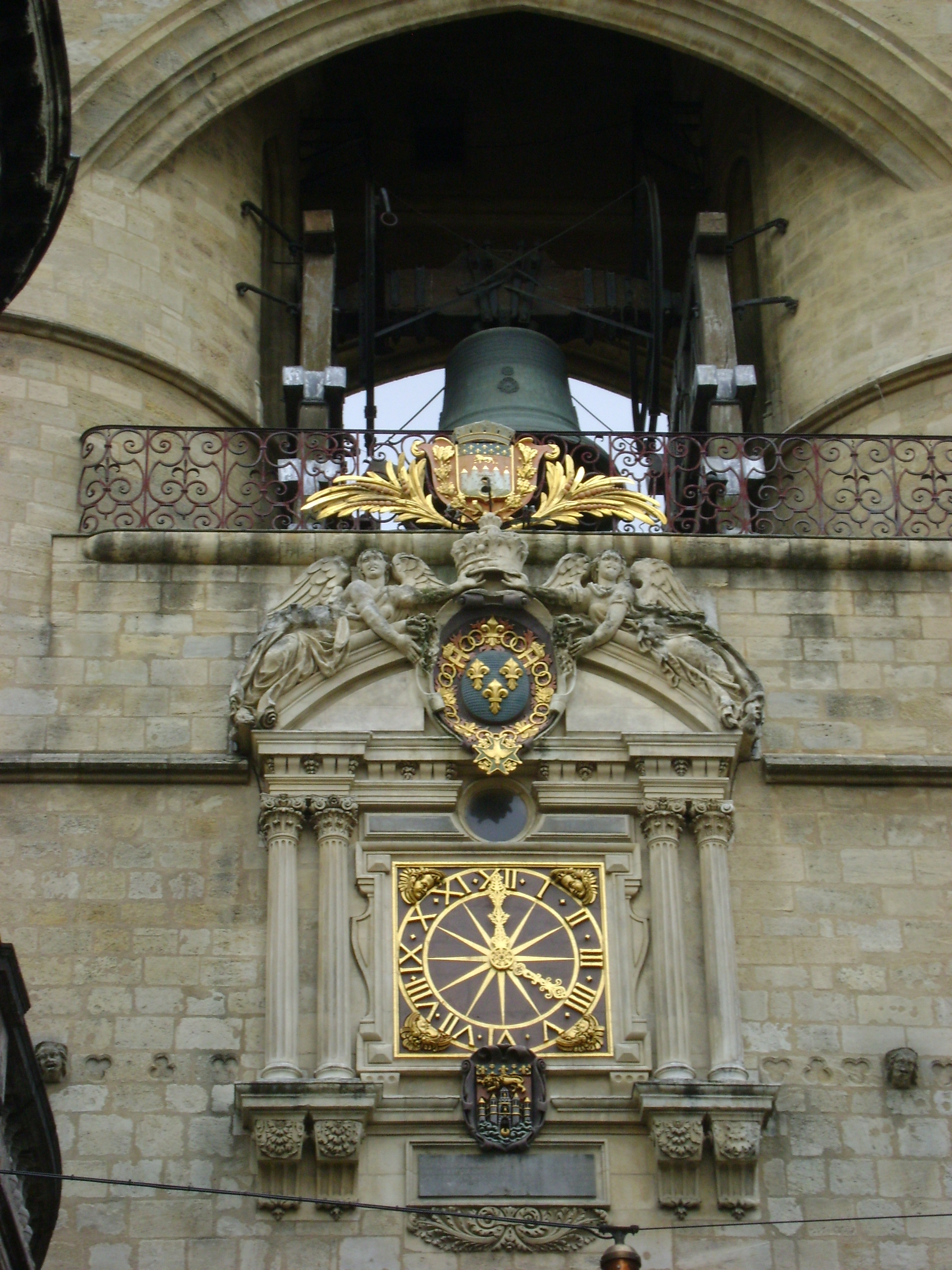 La Grosse Cloche de Bordeaux. Détail de l'Horloge du Coté Rue Saint-James. .